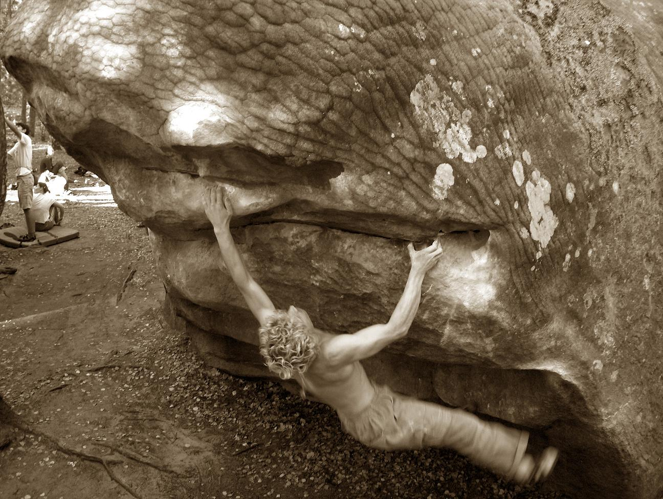 L'entrainement c'est important